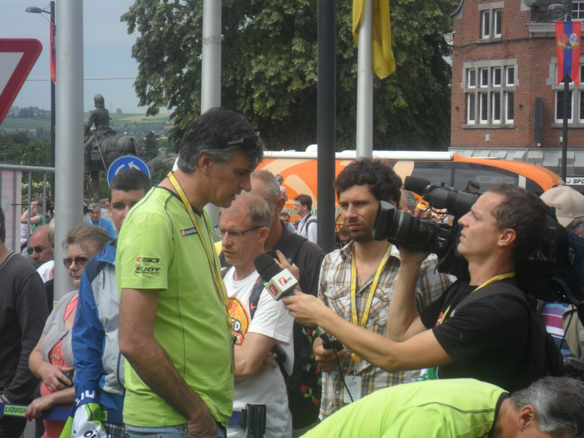 Team Liquigas in Visé voor de start van de 2e etappe van de Tour de France 2012.